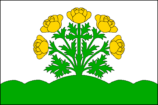 vlajka, Vítězná, okres Trutnov